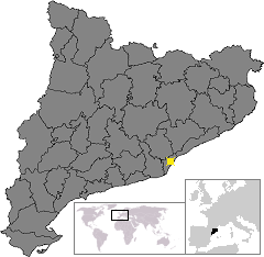 Localització de Barcelona. Location of Barcelona in Catalonia.